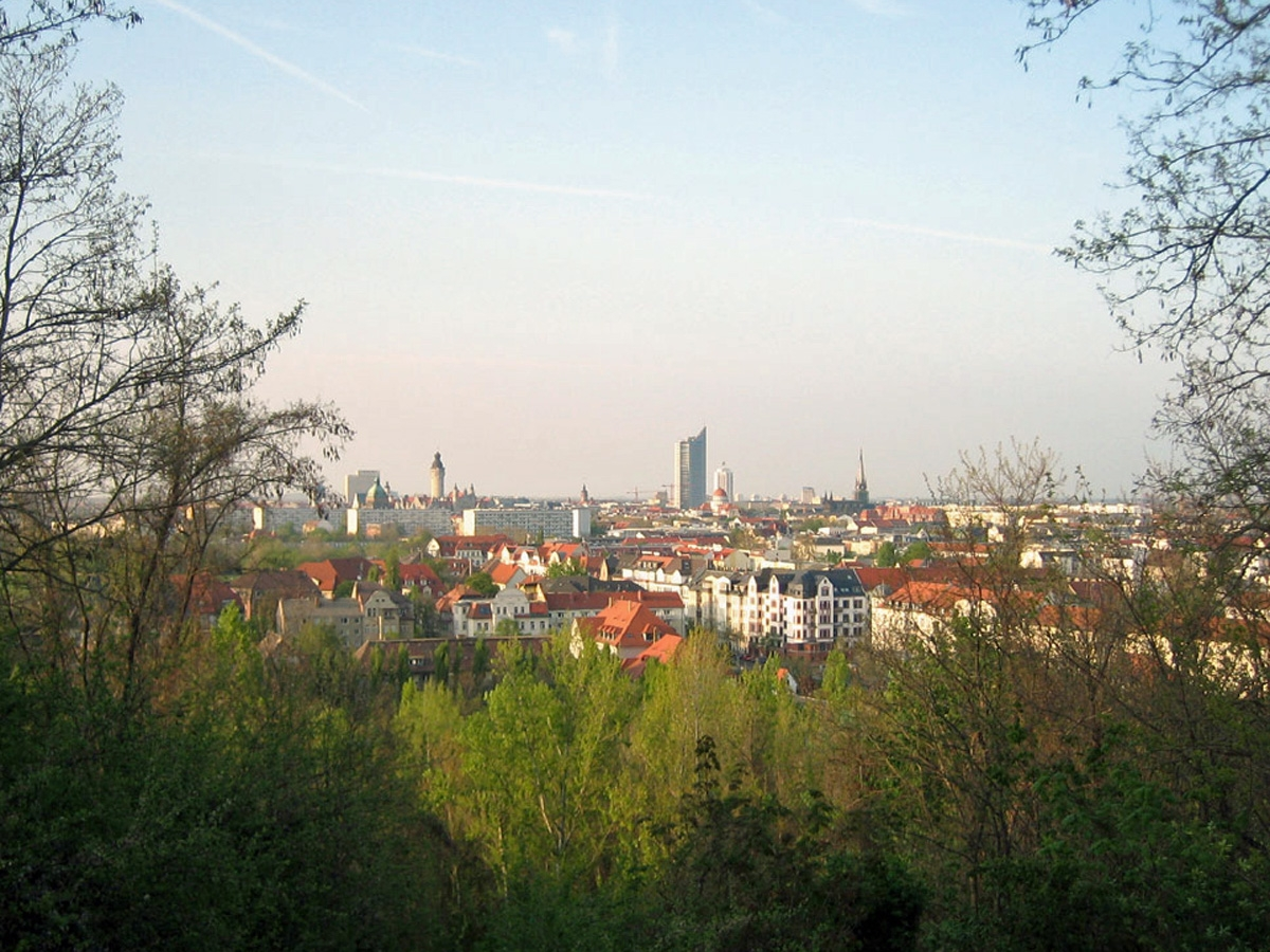 Blick vom Fockeberg